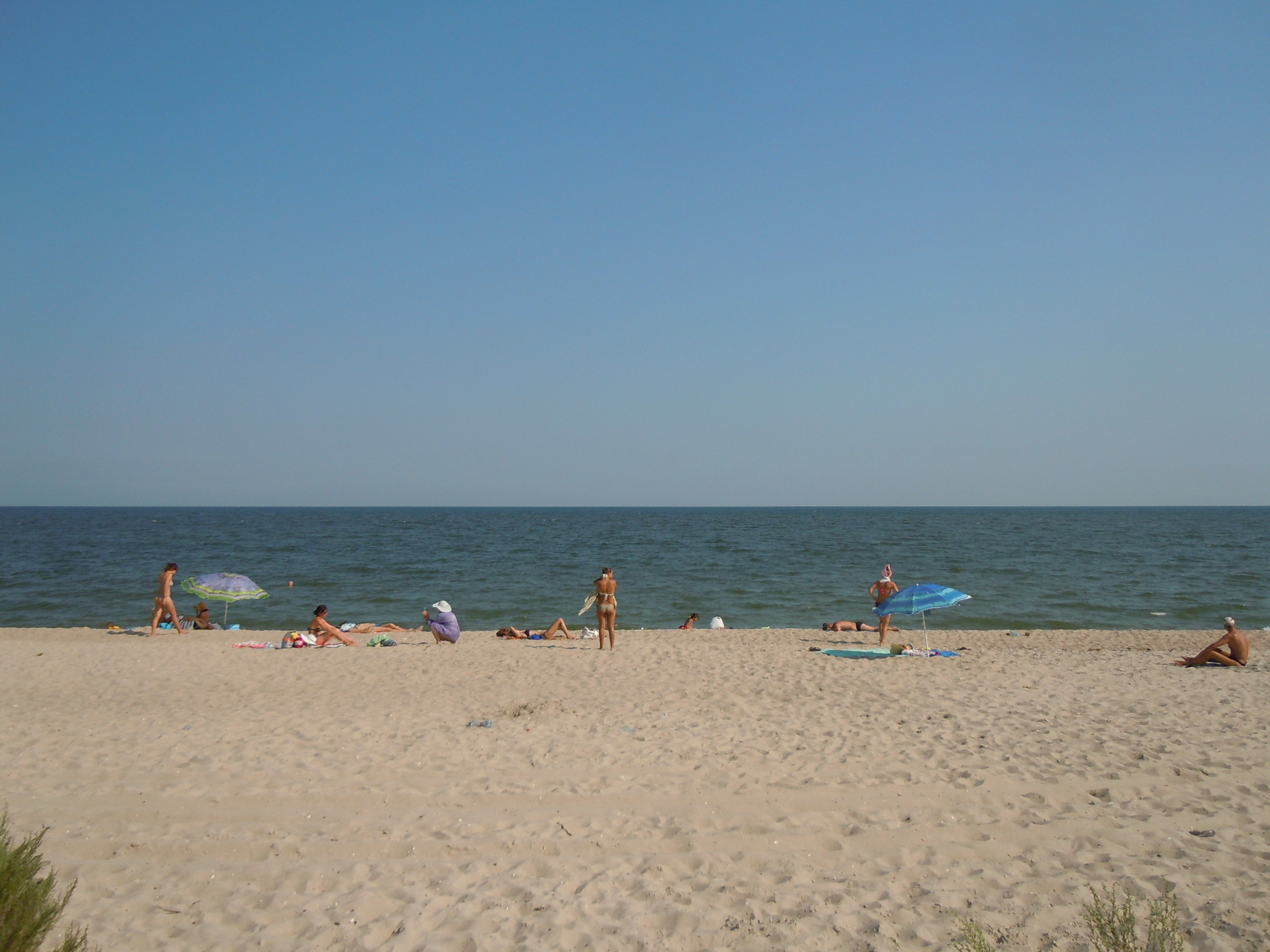 Пляж селища Сергіївка